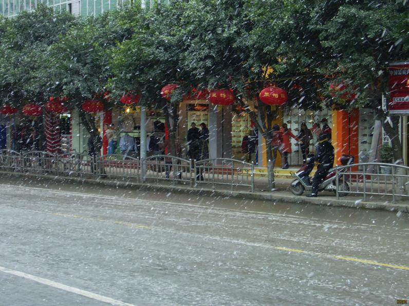 阆中郎家拐